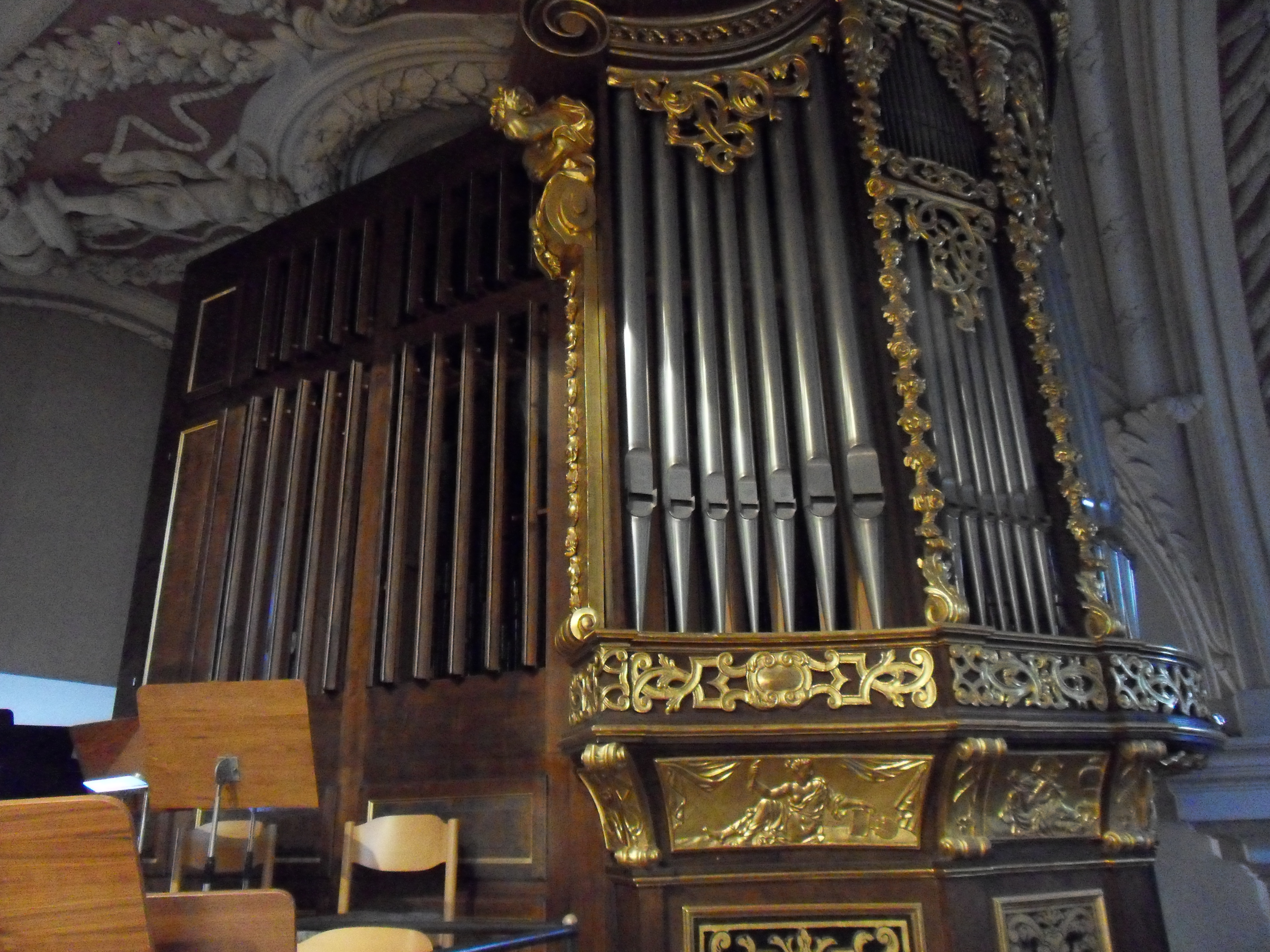 Evangelienorgel im Passauer Dom